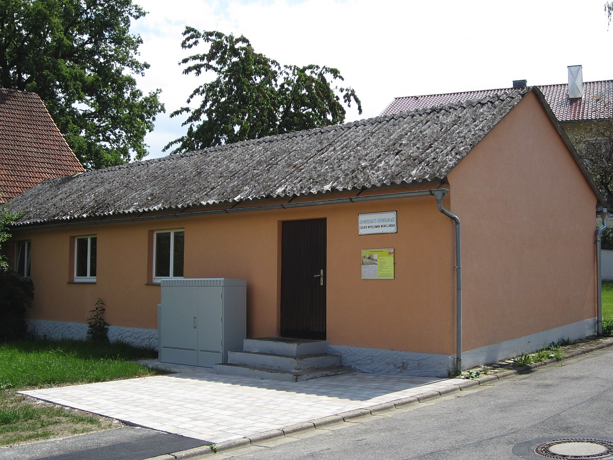 Gemeinschaftsgefrieranlage in Steinfeld (Stadelhofen), erbaut 1958